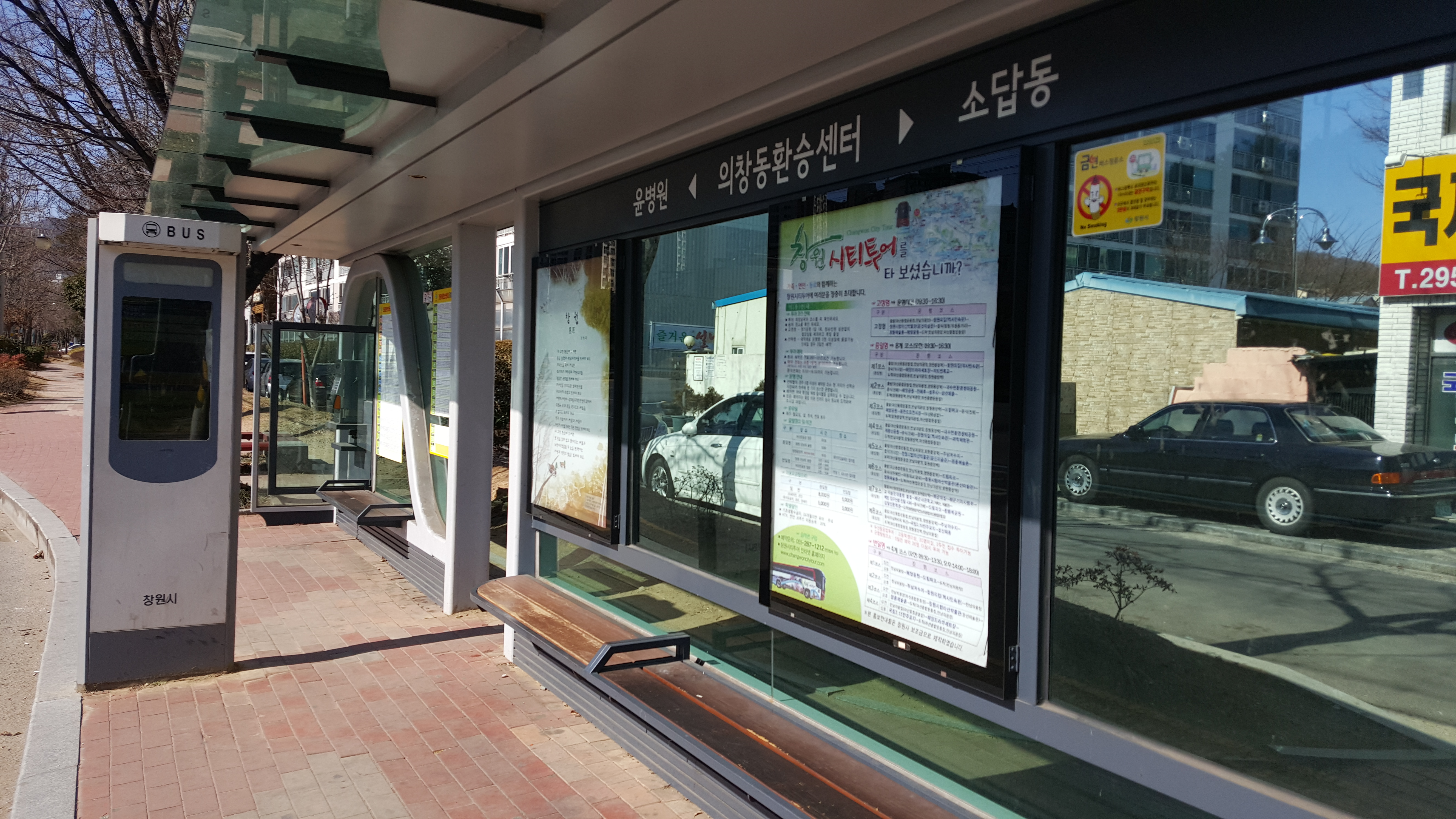 2016년 2월 경상남도 창원시의 의창동환승센터 버스 정류장